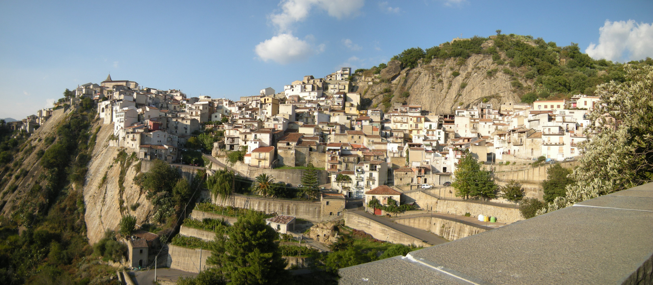 Comune di Motta Camastra, Messina, Sicilia.